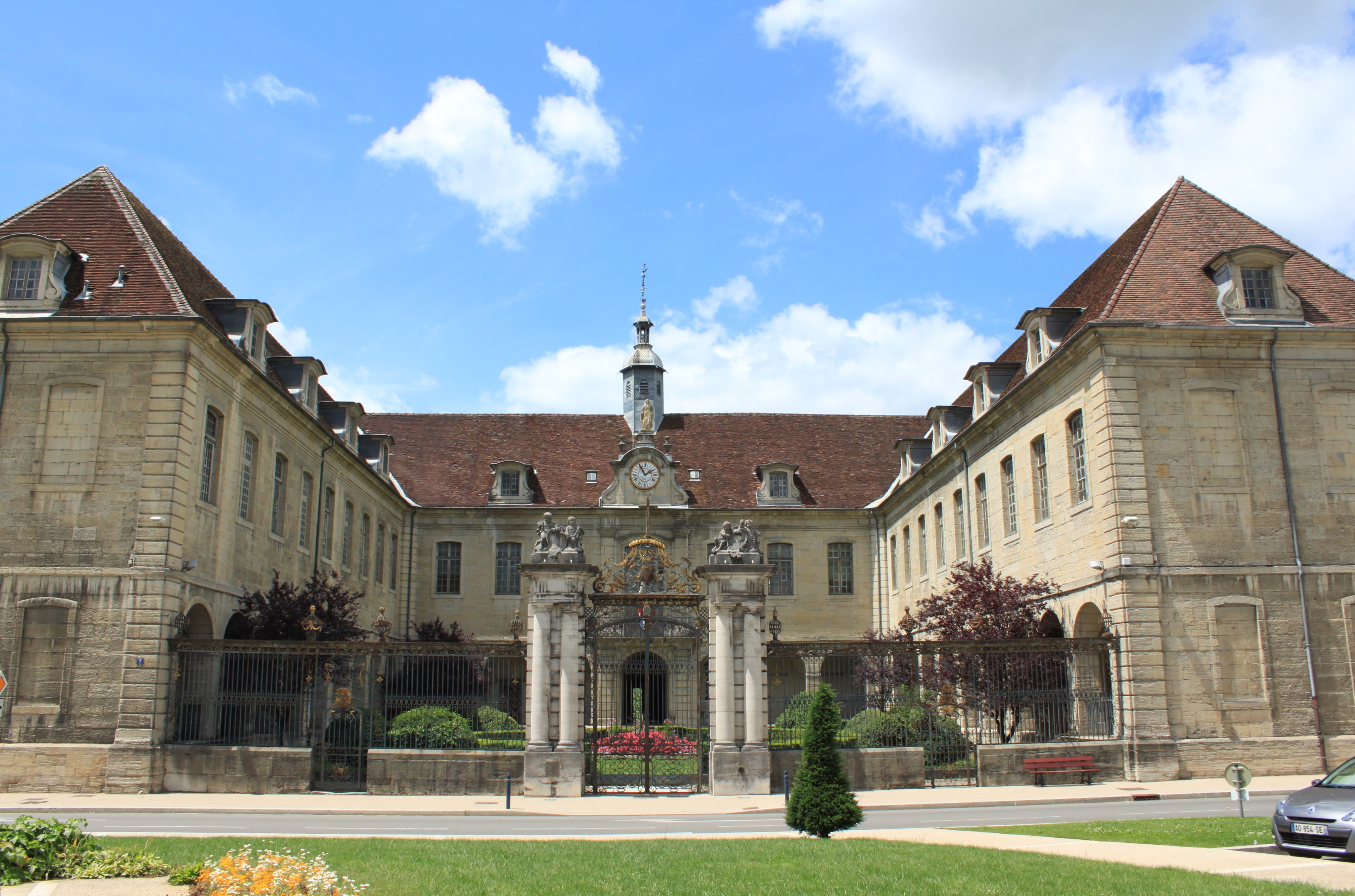 Lons-le-Saunier, Franche-Comté, France